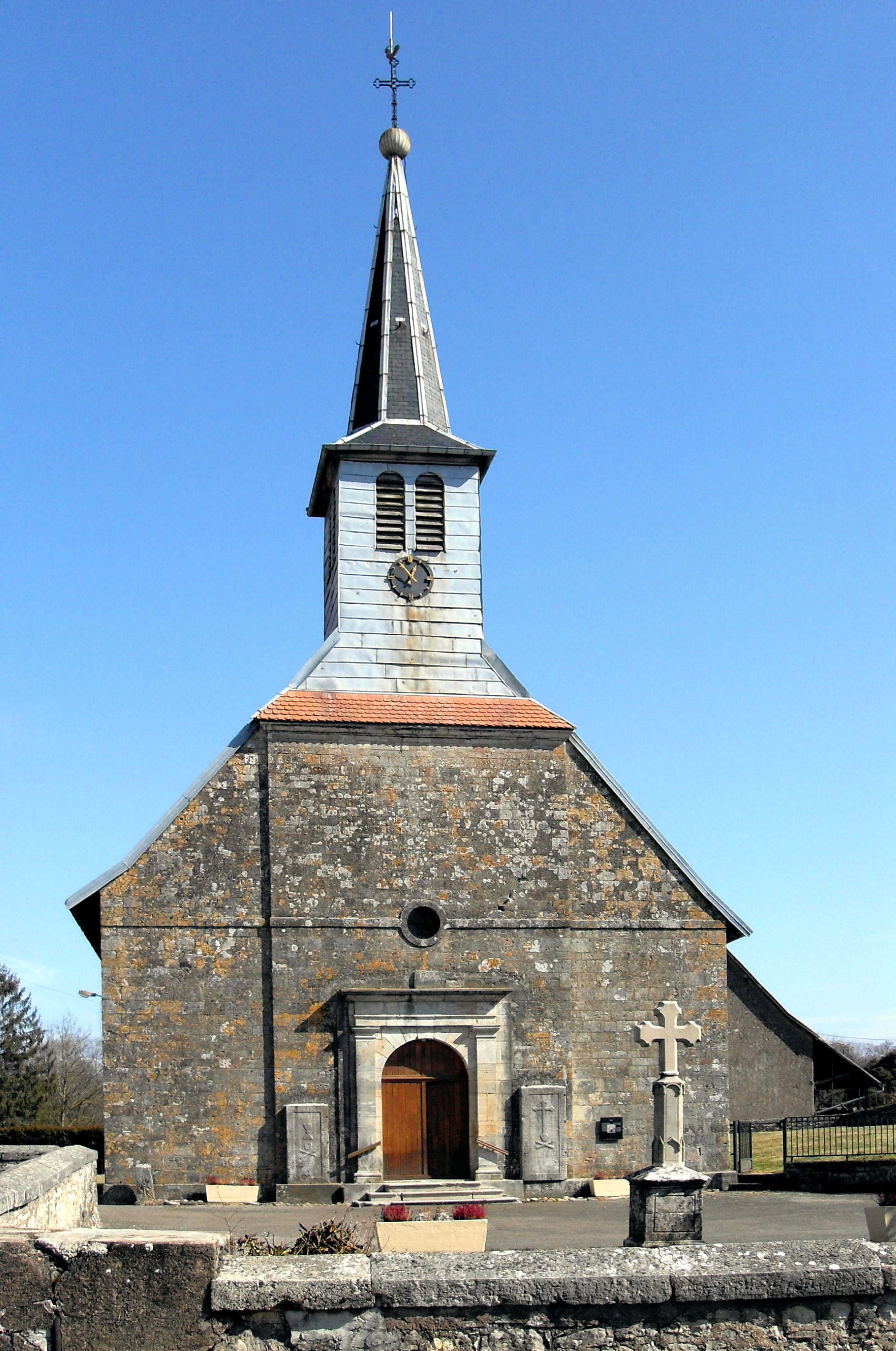 L'église Saint-Pierre à Froidefontaine